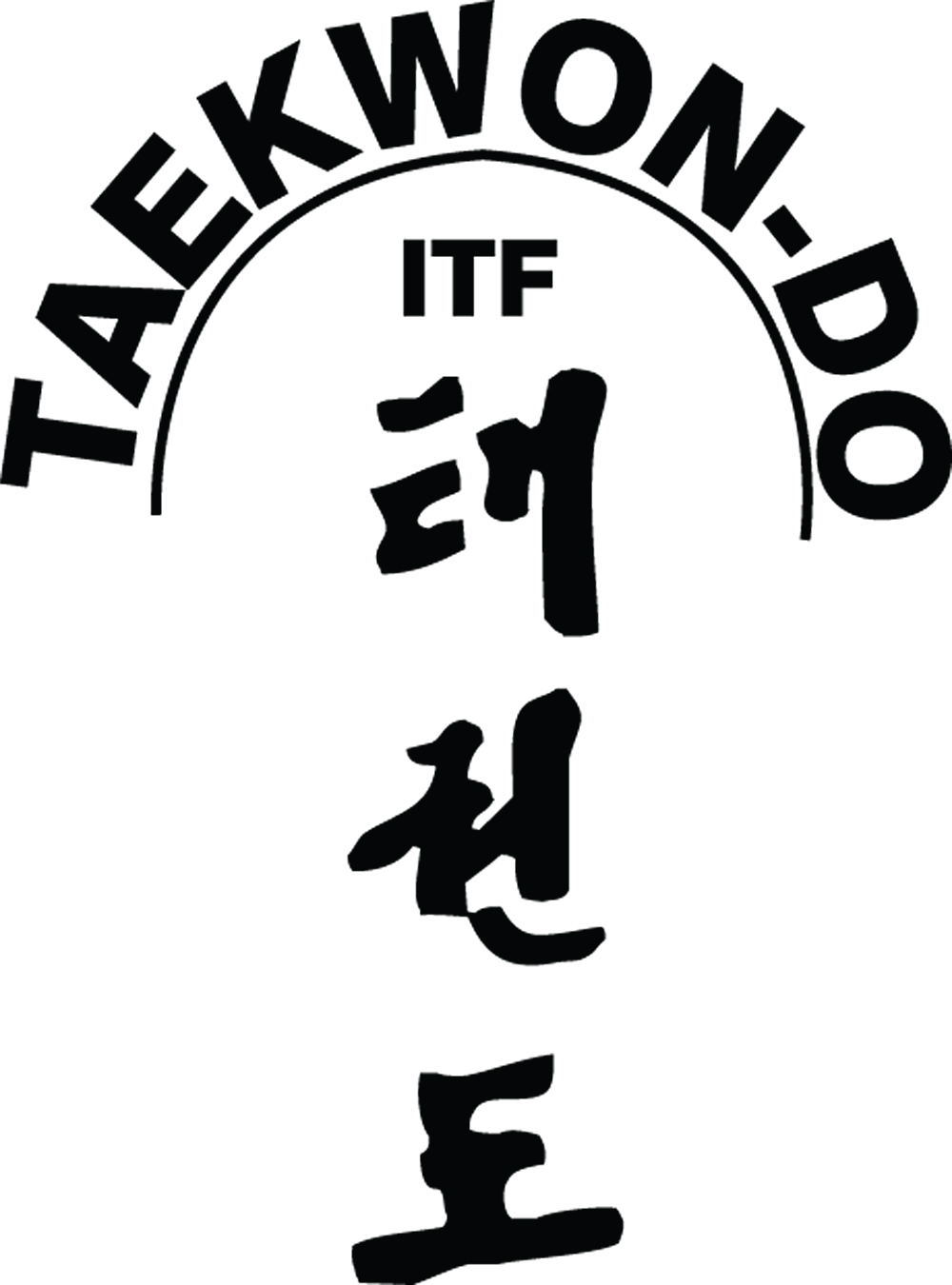 arbol de Taekwondo